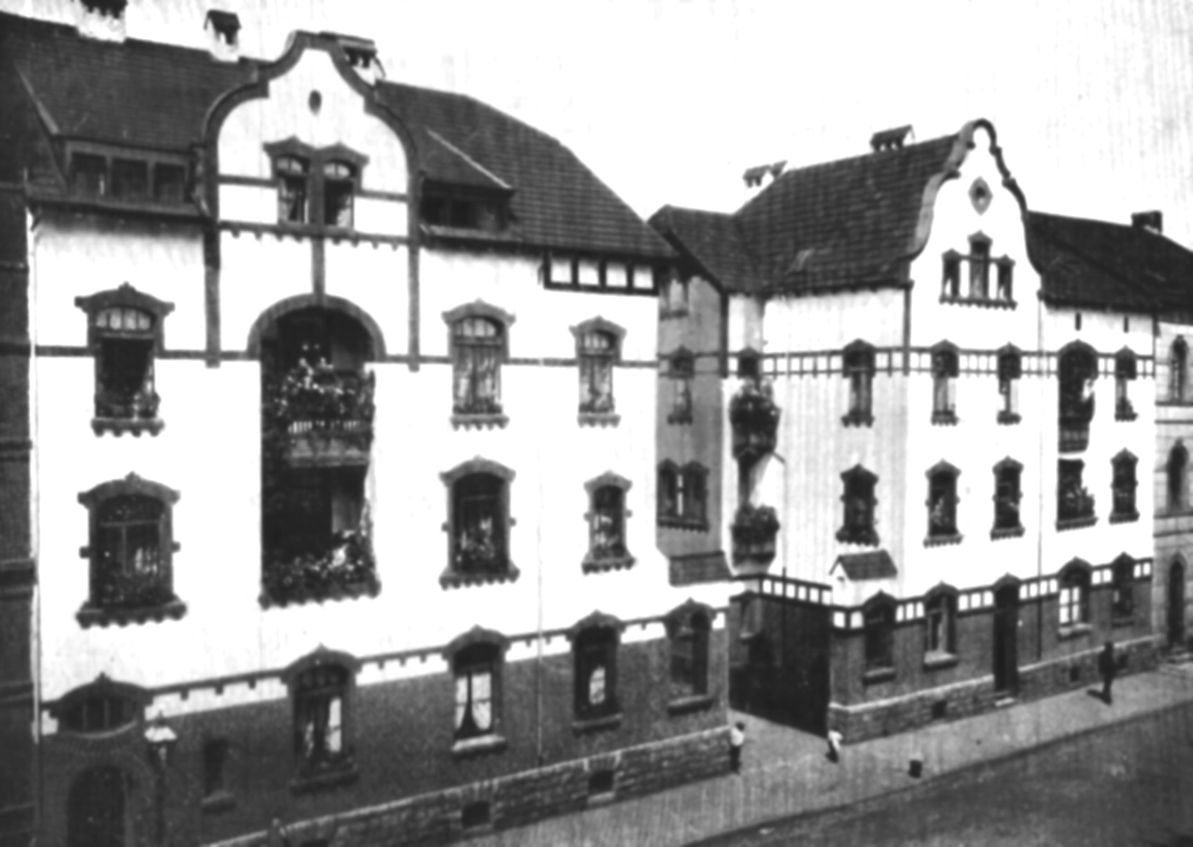 Die Gewoge-Siedlung Hanbruch, vor 1912